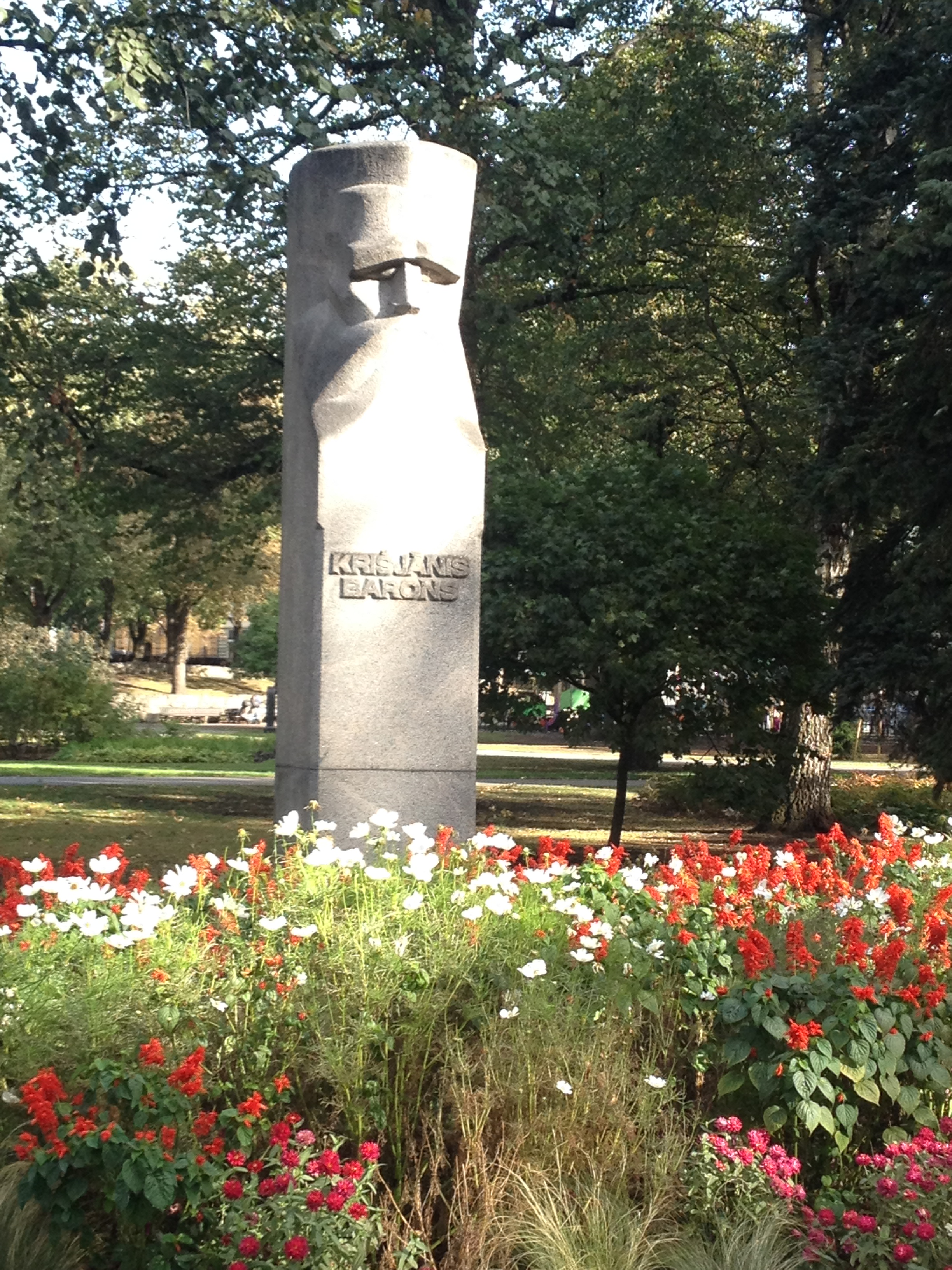 Piemineklis Krišjānim Baronam Vērmanes dārzā